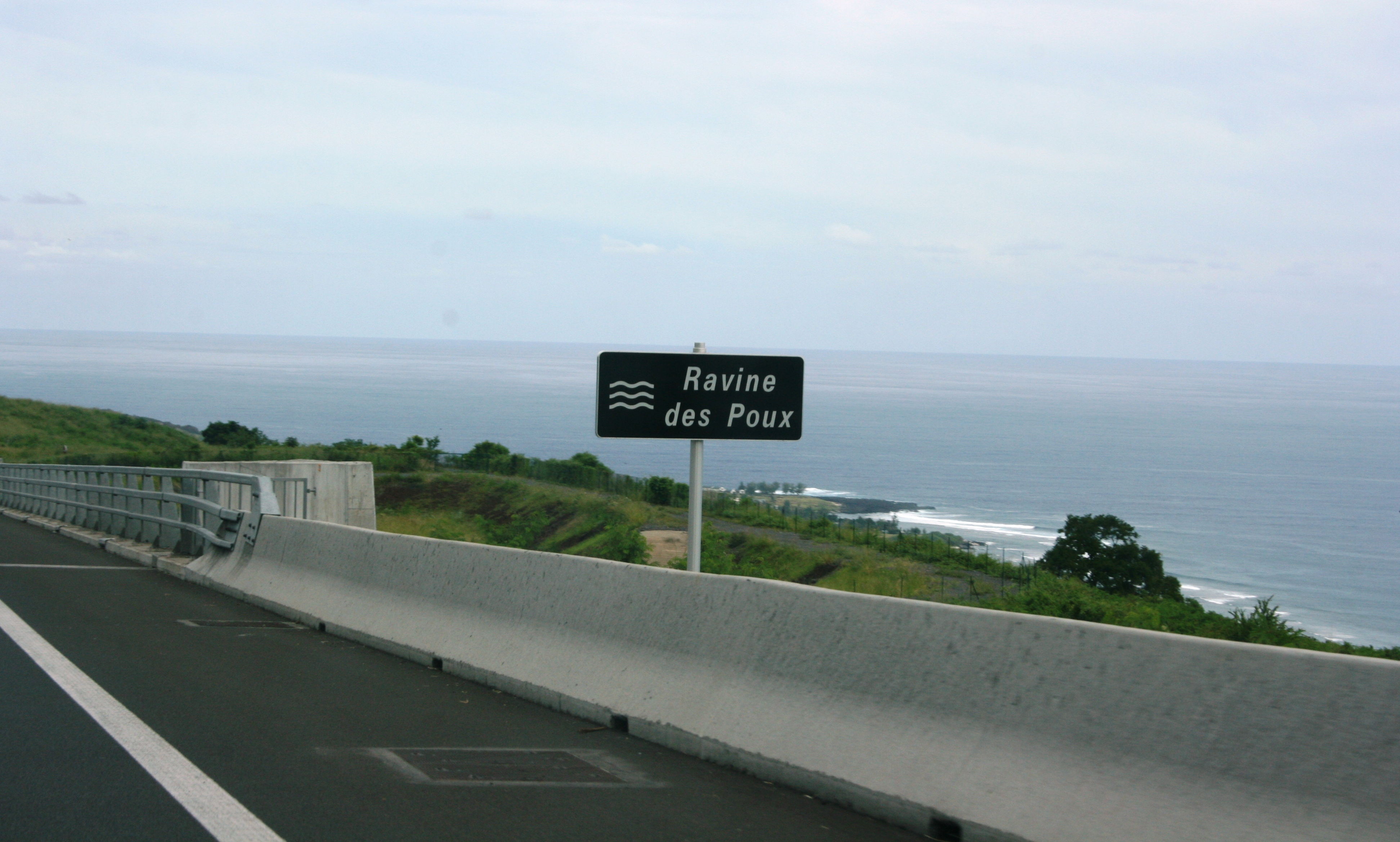 Panneau routier indiquant la ravine des Poux à Saint-Leu de La Réunion.